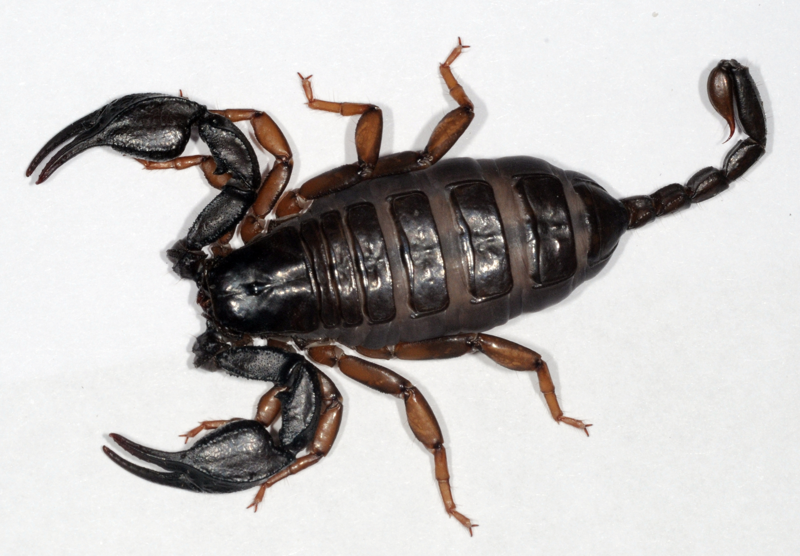 Euscorpius italicus, Weibchen, Gefangenschaft, ursprünglich aus dem Wallis, Schweiz